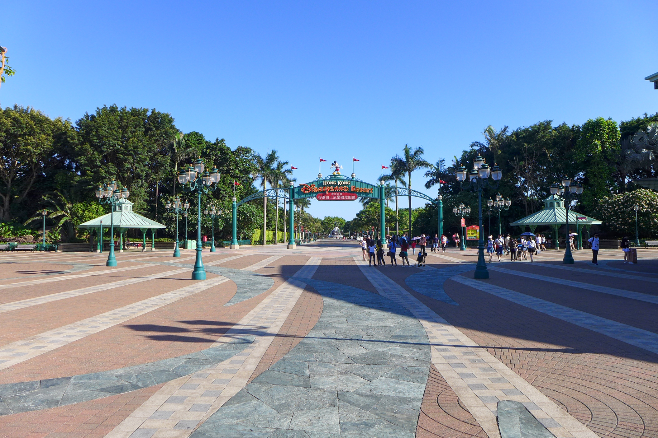 Hong Kong Disneyland Resort